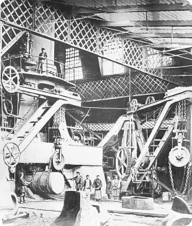 Пермские пушечные заводы в Мотовилихе, Царь-молот.